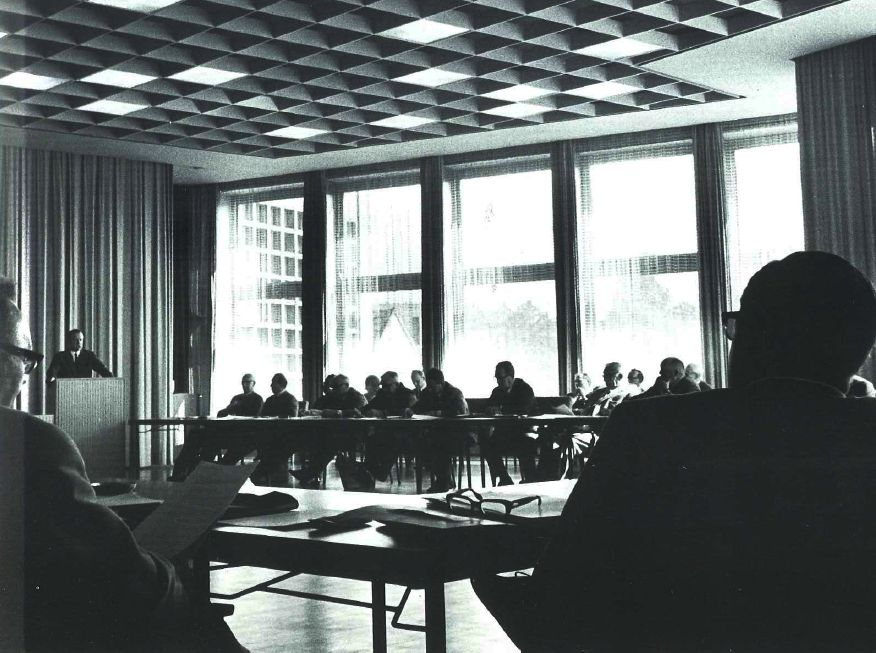 Sitzung des Tecklenburger Kreistages